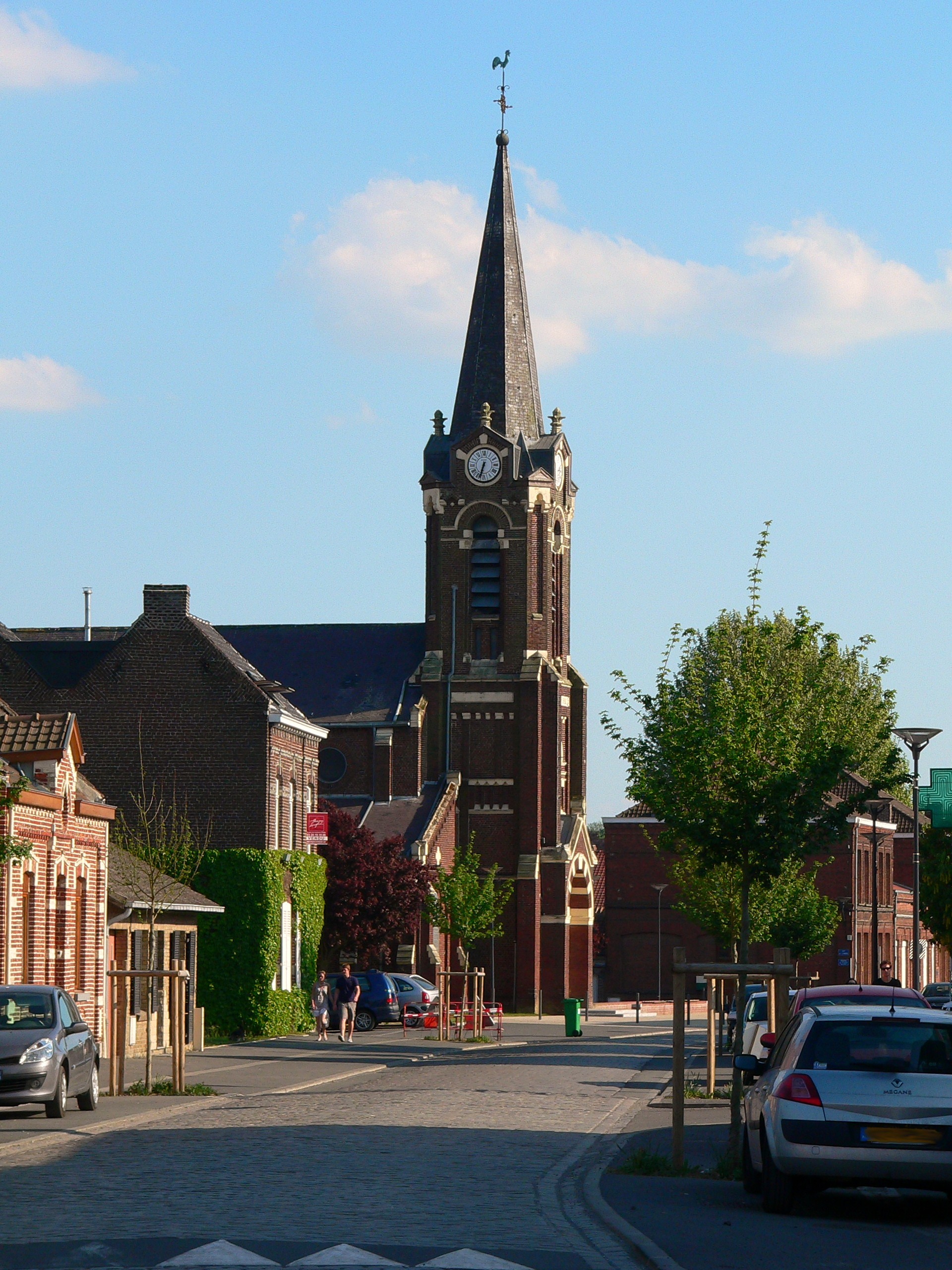 Centre de Cappelle-en-Pévèle